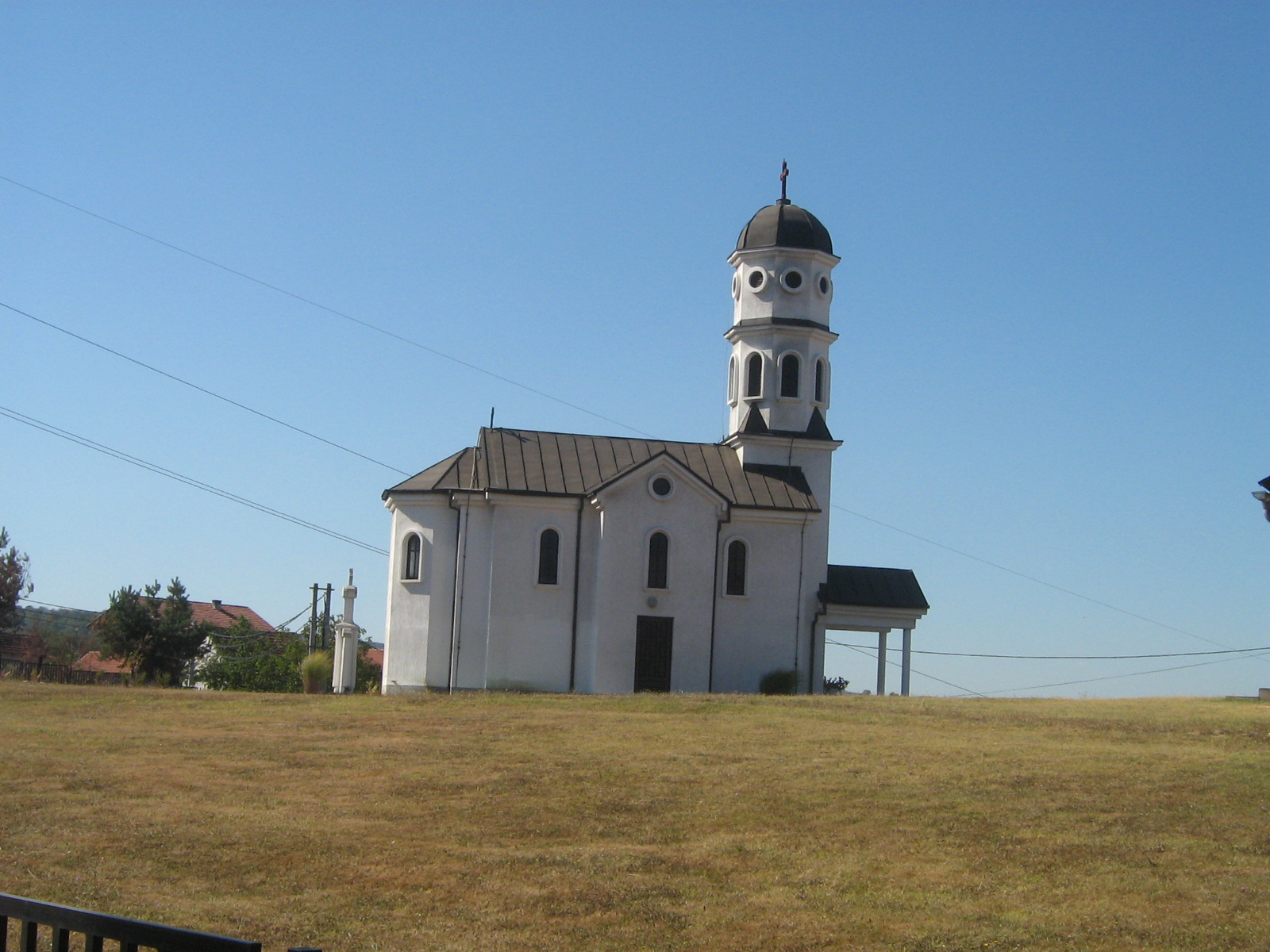 Православни храм свете мученице Недеље у Липцу. Нешковић Дејан